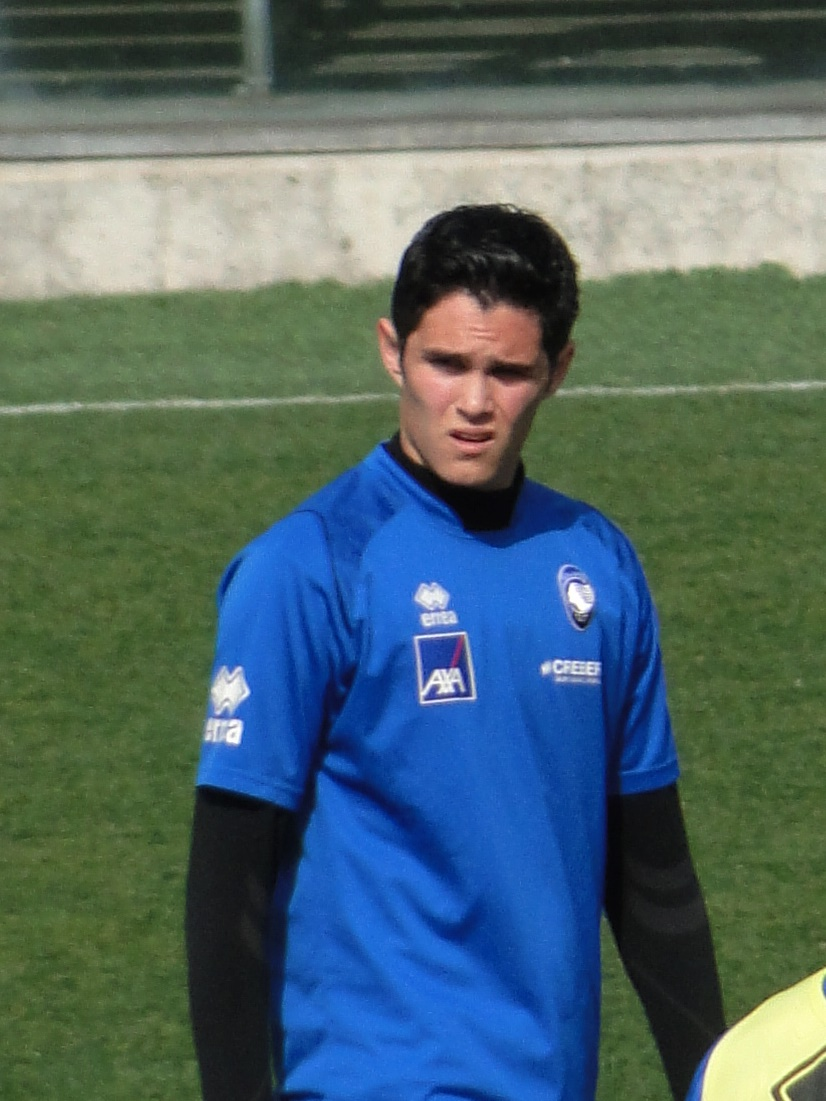 Rúben Bentancourt, calciatore uruguaiano